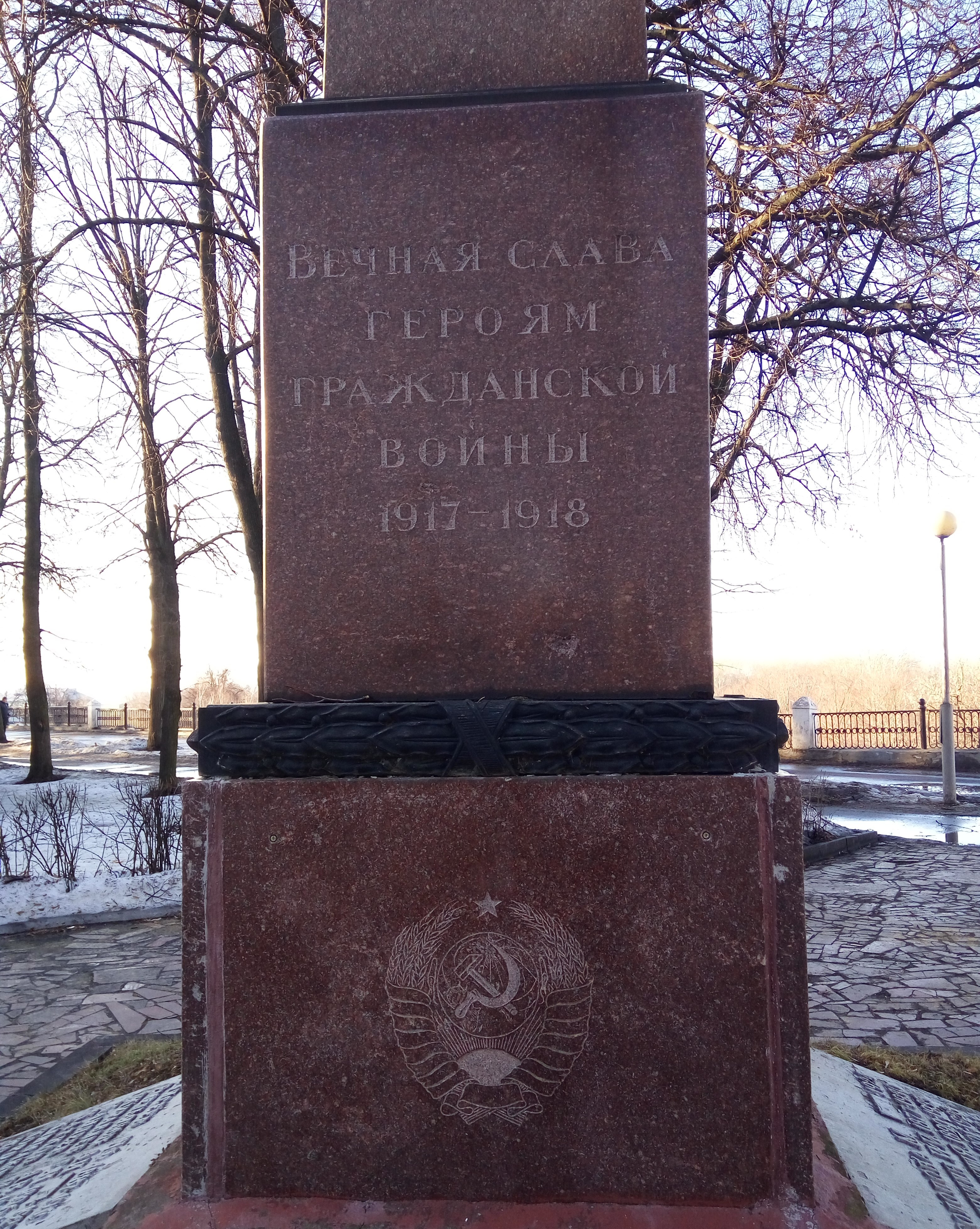 Стела героям гражданской войны 1917-1918 годов (Рязань), вид спереди